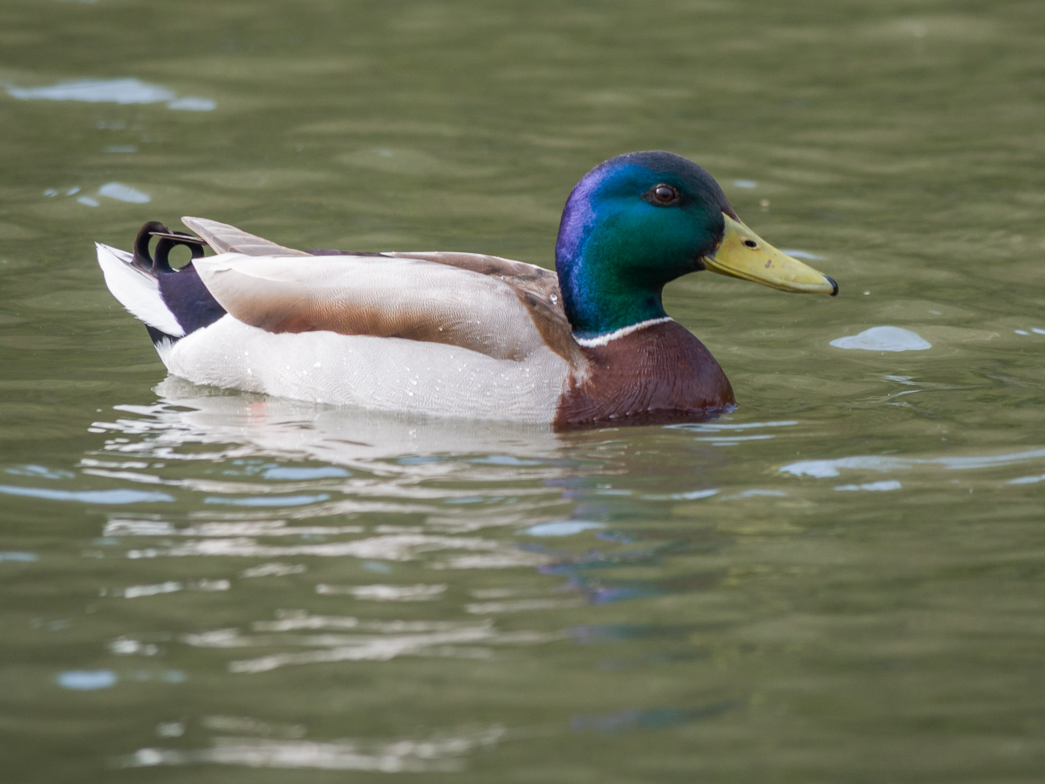 Mallard